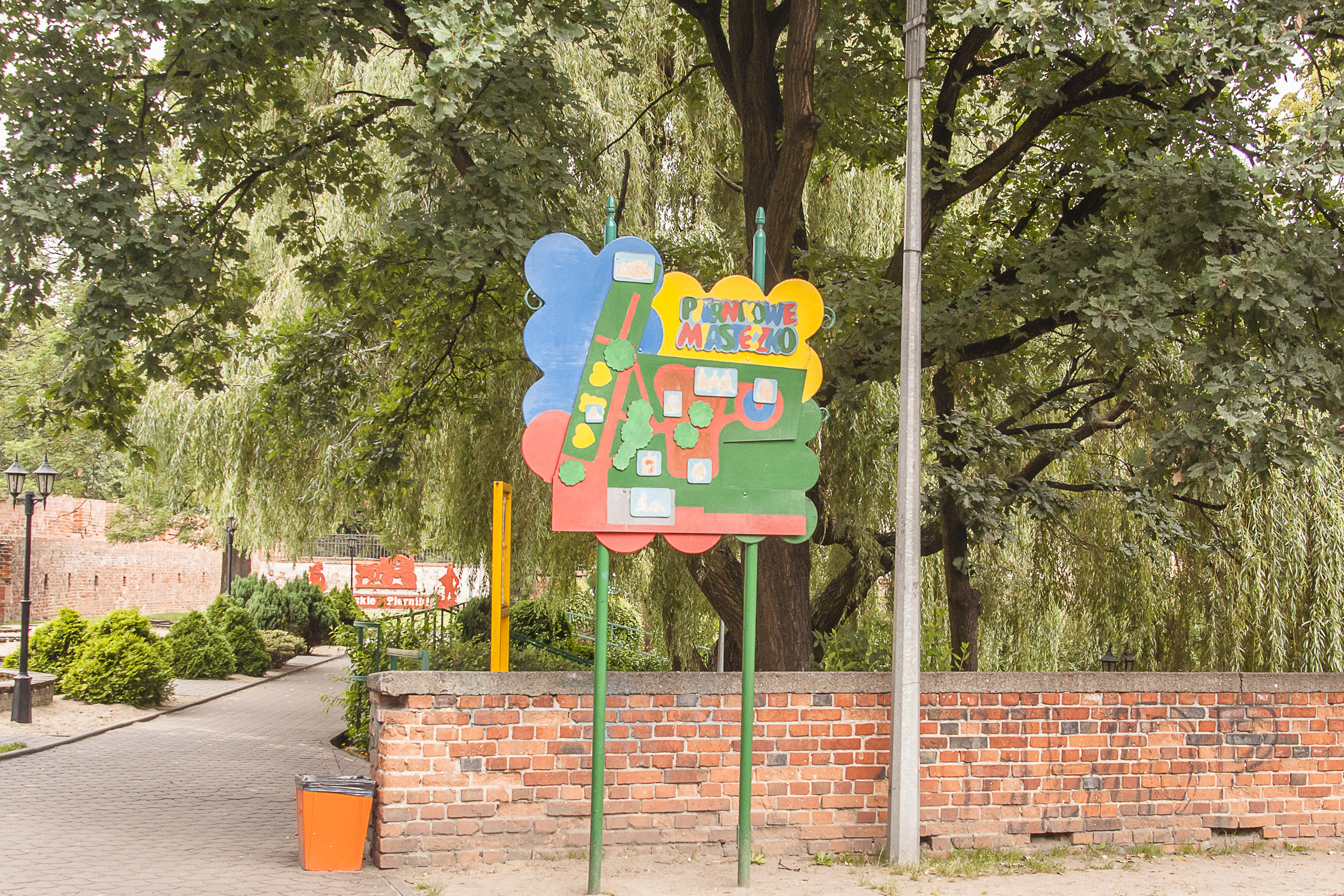 Piernikowe Miasteczko, Plac zabaw przy ul. Podmurnej